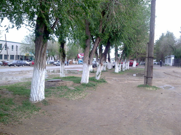 Город Шалкар (Челкар), ул. Есет Батыра